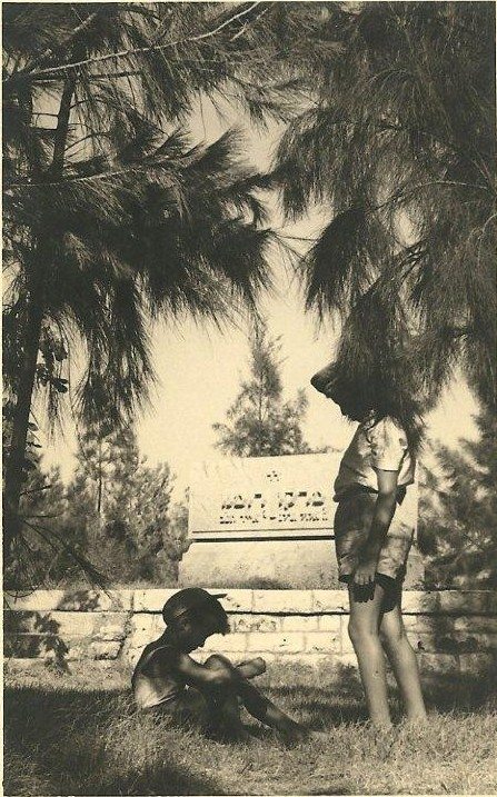 "גן מרקו רומנו" בכפר חיטים בו שכנה חלקת קברו של ד"ר מרדכי מרקו רומנו במשך מספר שנים. התצלום מ-1956